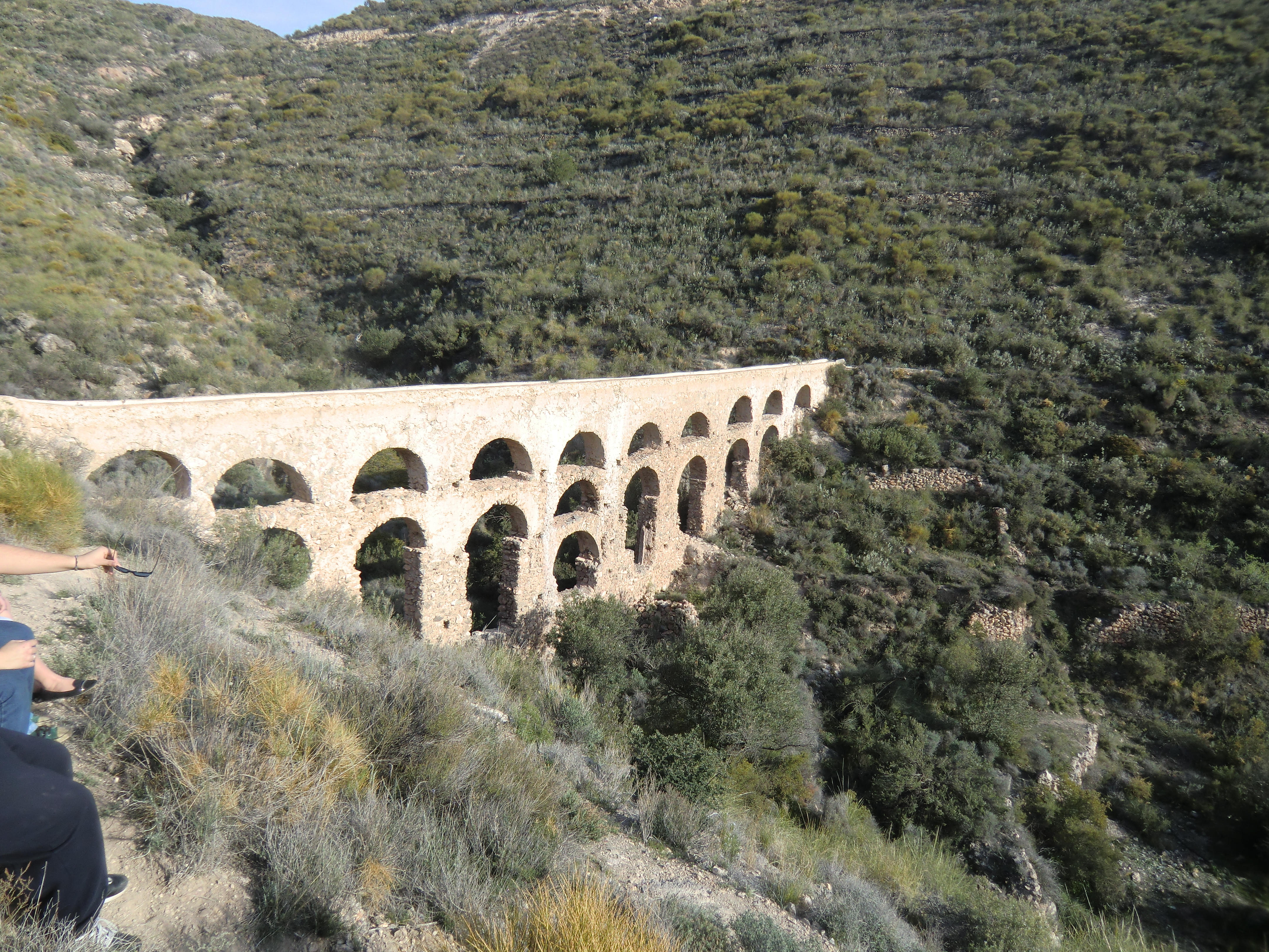 Vista frontal del acueducto de Carcauz